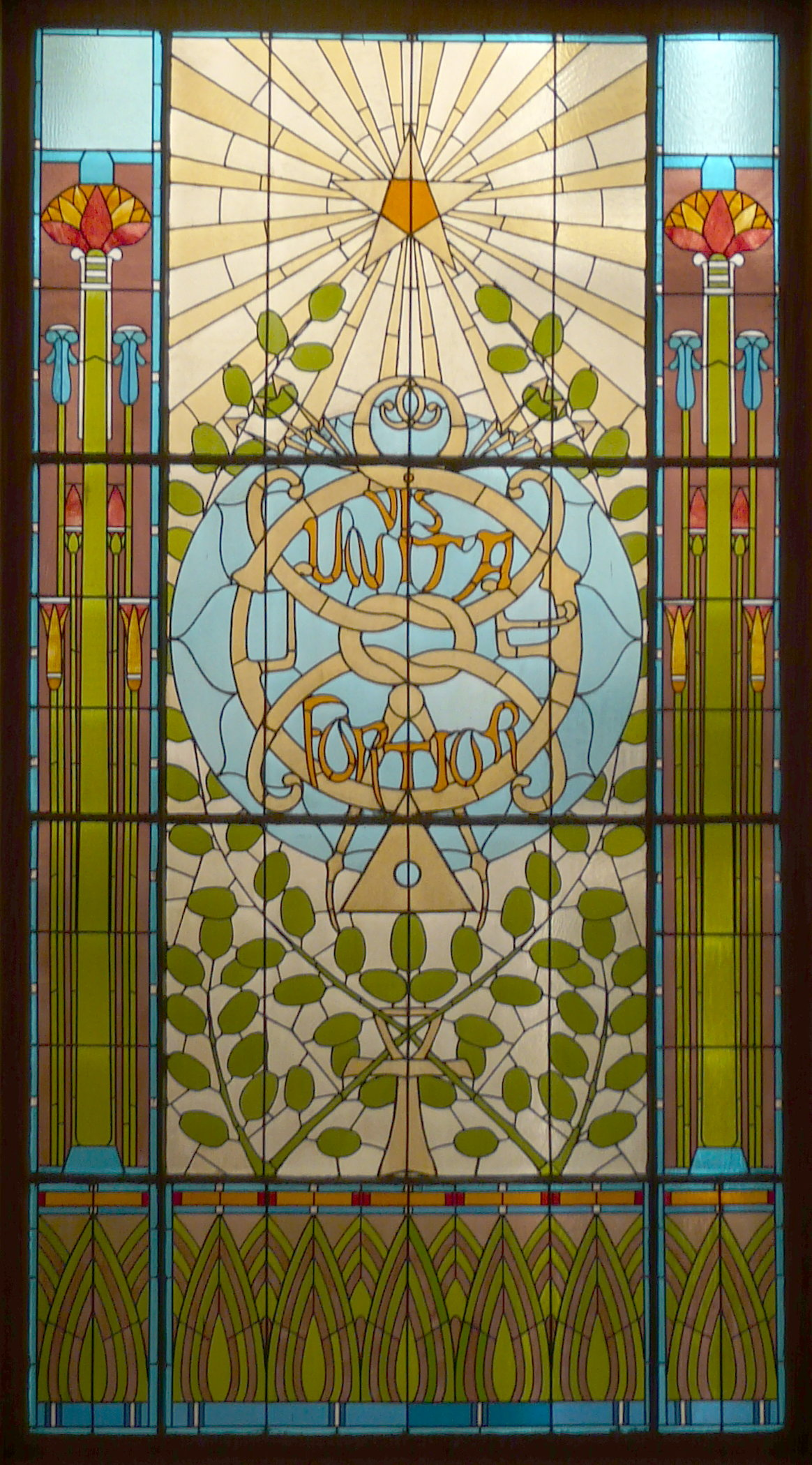 vitrail aux symboles maçonniques situé dans le temple de la rue de Laeken à Bruxelles. «VIS UNITA FORTIOR»